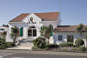 Mairie de Rivedoux-Plage - Île de Ré Photo issue de ma banque d'images personnelle : Pep.per